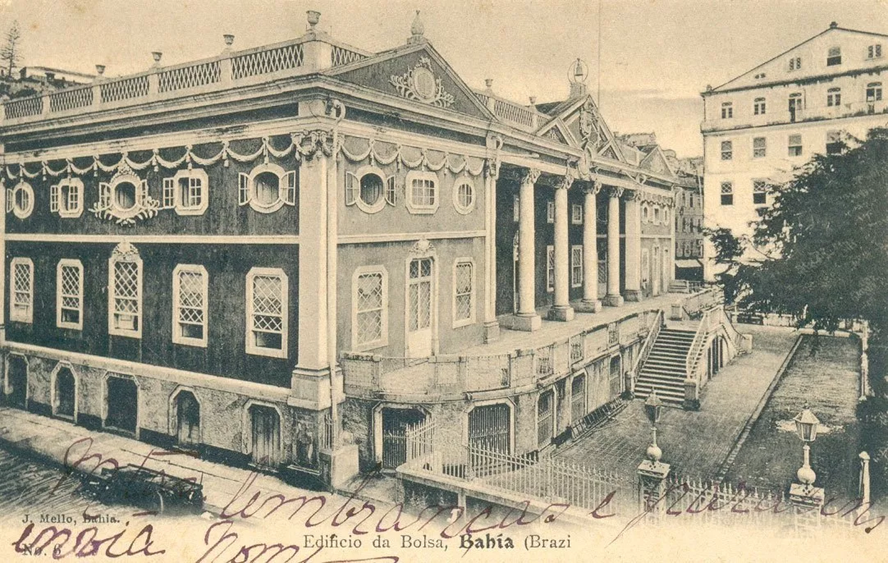 Edifício da Bolsa, Salvador, Bahia, Brasil, 1912. Cartão postal por J. Mello